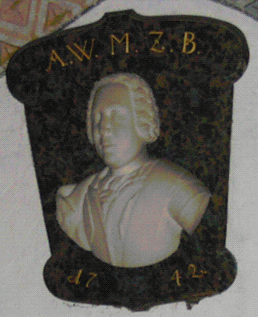 Ausschnitt aus dem Epitaph von Albrecht Wolfgang von Brandenburg-Bayreuth im Kloster Himmelkron